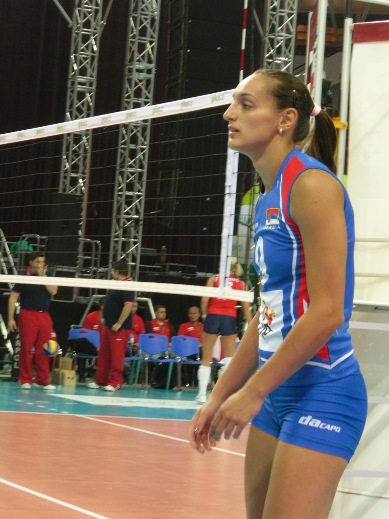 Zdjęcia zrobione podczas pierwszego dnia II Memoriału Agaty Mróz-Olszewskiej w katowickim Spodku.